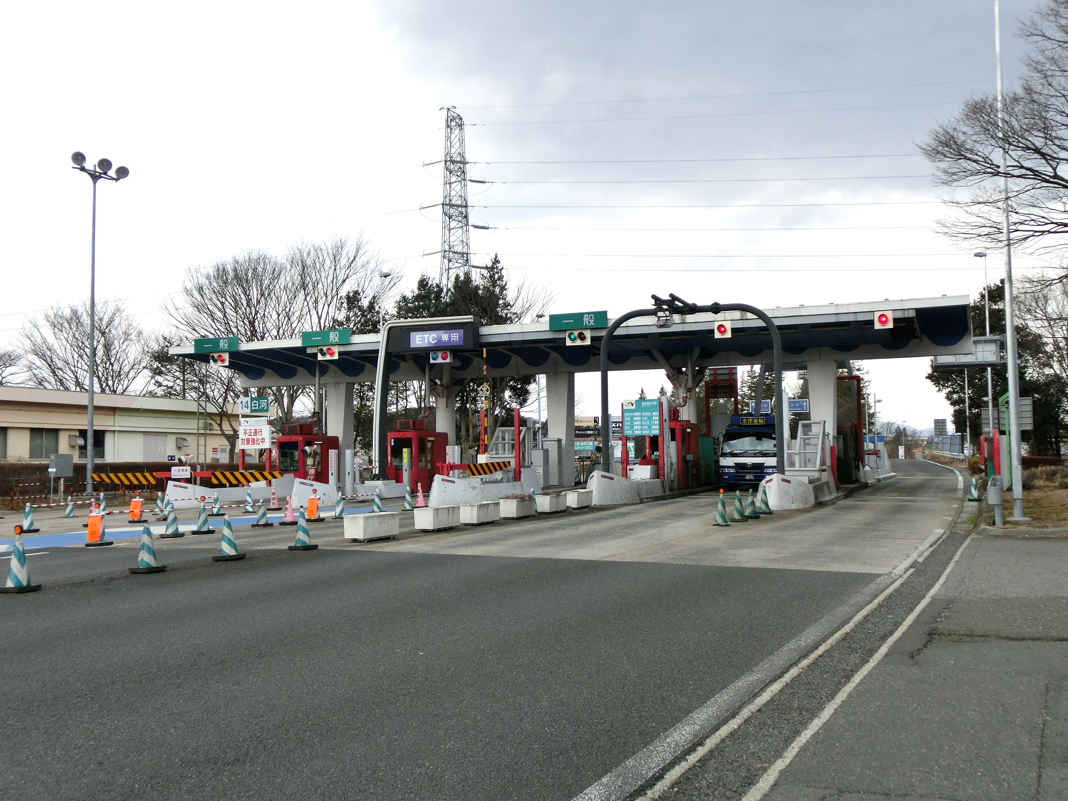 東北自動車道 白河インターチェンジ（料金所付近）